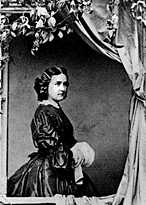 Franz Hanfstaengl: Lilla von Bulyovsky Foto: Deutsches Theatermuseum, München